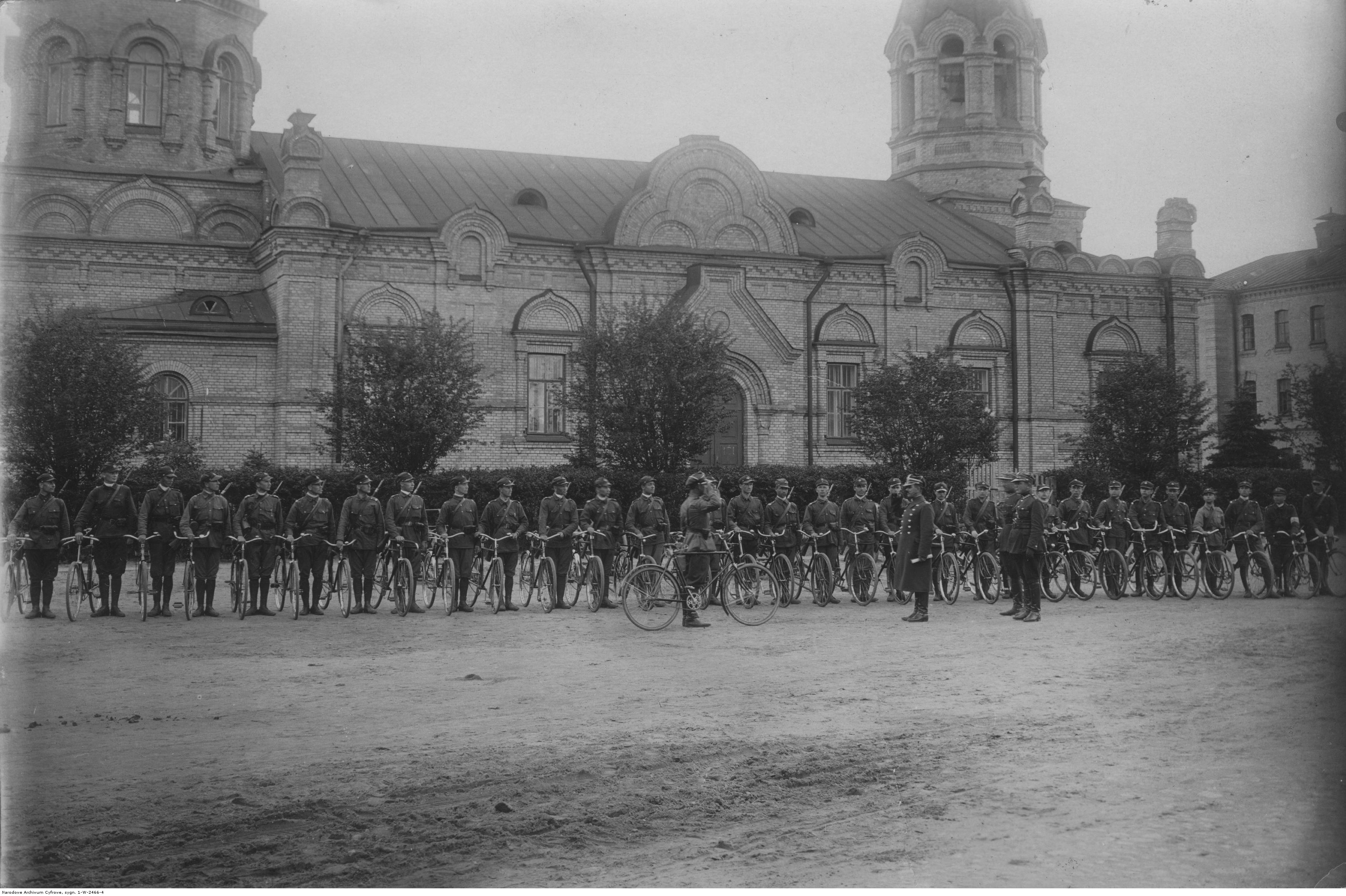 Wychowanie Fizyczne i Przysposobienie Wojskowe w Prużanie. Pluton cyklistów z hufców szkolnych z Państwowego Gimnazjum w Prużanie, przybyły do Słonimia na ćwiczenia dywizyjne. Powiatowy komendant WFiPW w Prużanie por. Leon Gnatowski zdaje raport dowódcy 80 Pułku Piechoty w Słonimie płk. Romualdowi Kohutnickiemu. Koncern Ilustrowany Kurier Codzienny - Archiwum Ilustracji. Sygnatura: 1-W-2466-4